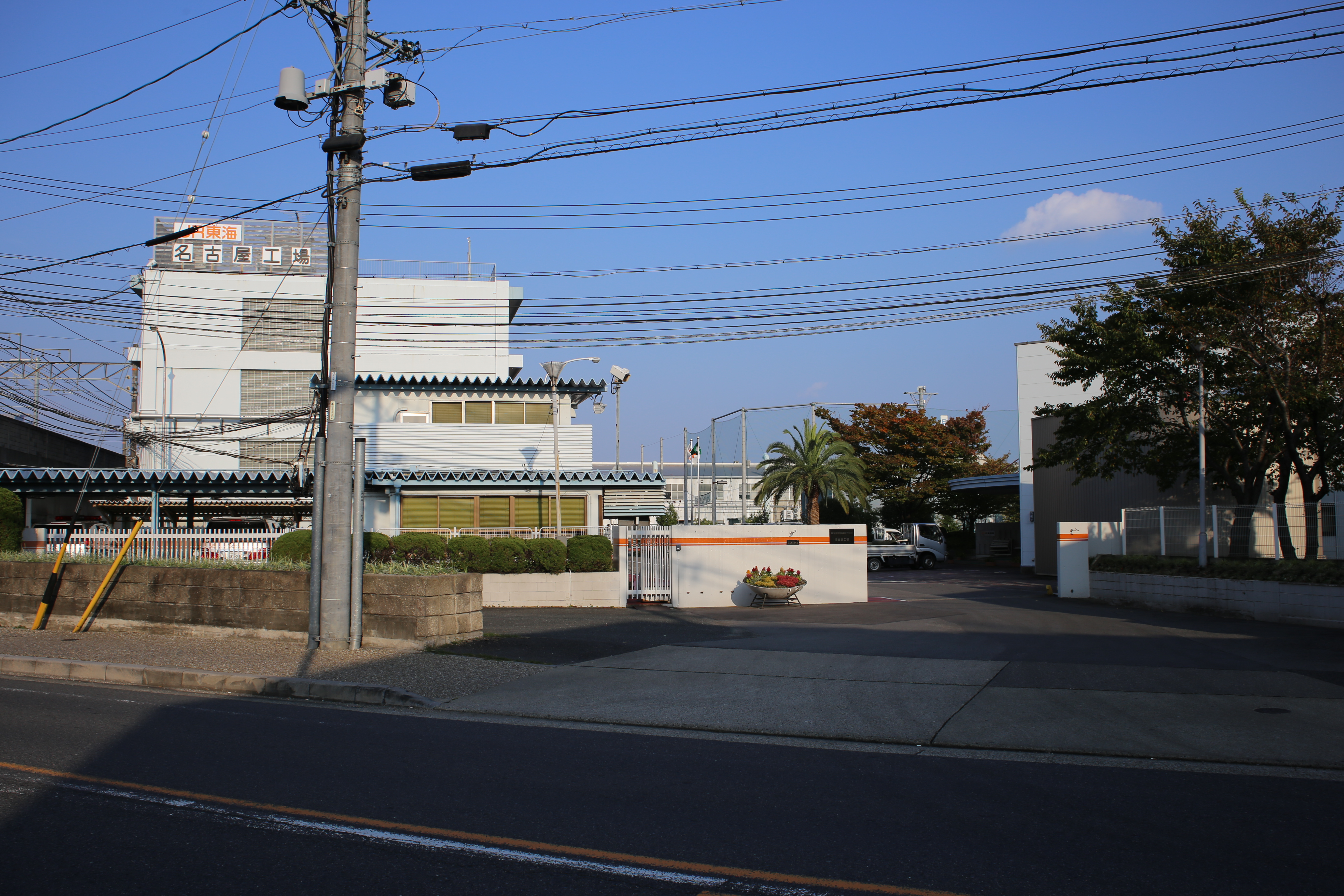 名古屋市中川区の東海旅客鉄道（JR東海）名古屋工場正門を西側公道より撮影